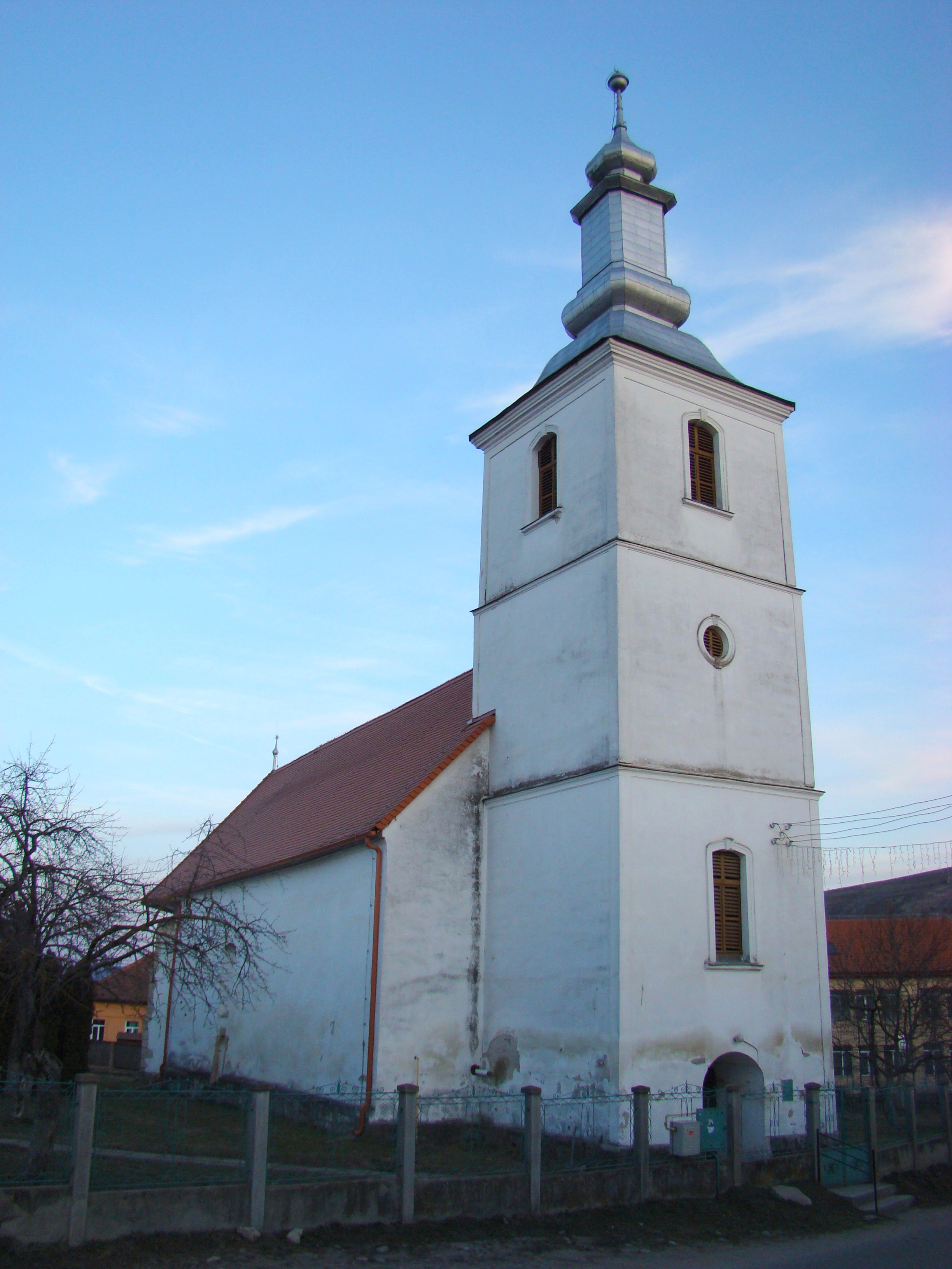 Biserica reformată, sat LUNA DE SUS; comuna FLOREŞTI